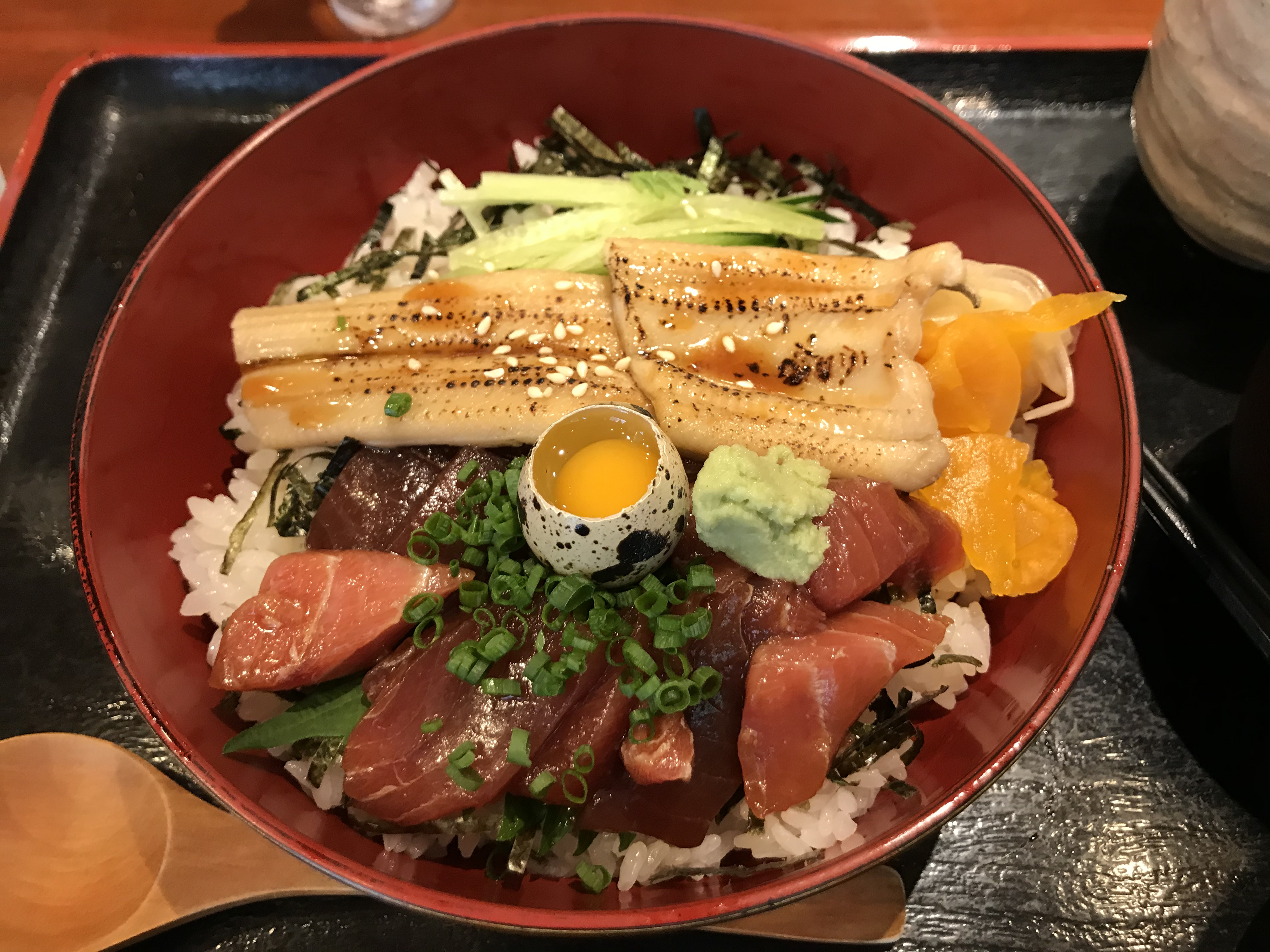 ランチで食べました。